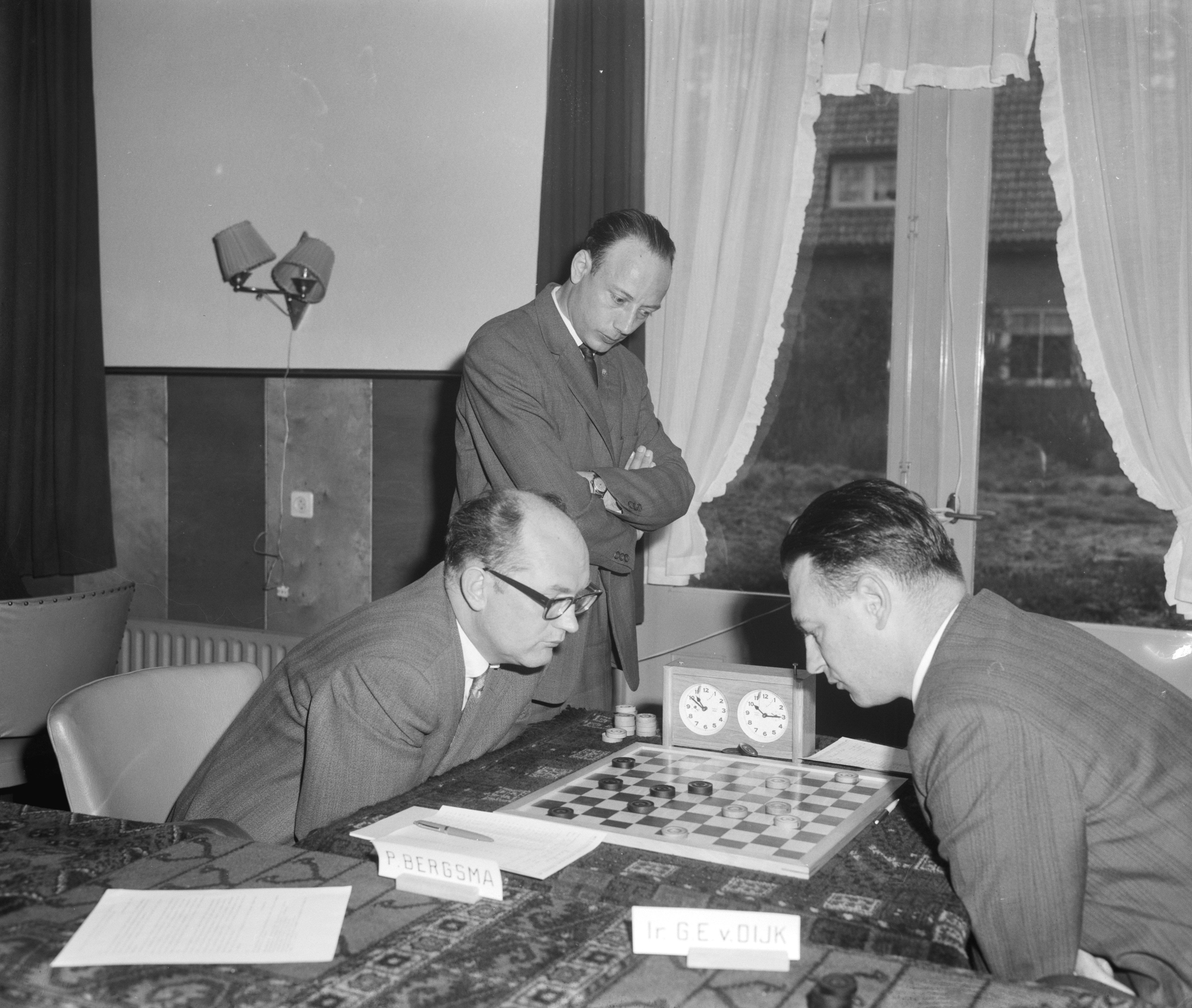 Collectie / Archief : Fotocollectie Anefo Reportage / Serie : [ onbekend ] Beschrijving : Damkampioenschap van Nederland te Apeldoorn, links Bergsma rechts Van Dijk . Roozenburg kijkt toe Datum : 18 april 1963 Locatie : Apeldoorn, Gelderland Trefwoorden : dammen, denksporten Persoonsnaam : Bergsma, Pieter, Dijk, Geert van, Roozenburg, Piet Fotograaf : Bilsen, Joop van / Anefo, [onbekend] Auteursrechthebbende : Nationaal Archief Materiaalsoort : Negatief (zwart/wit) Nummer archiefinventaris : bekijk toegang 2.24.01.04 Bestanddeelnummer : 915-0554